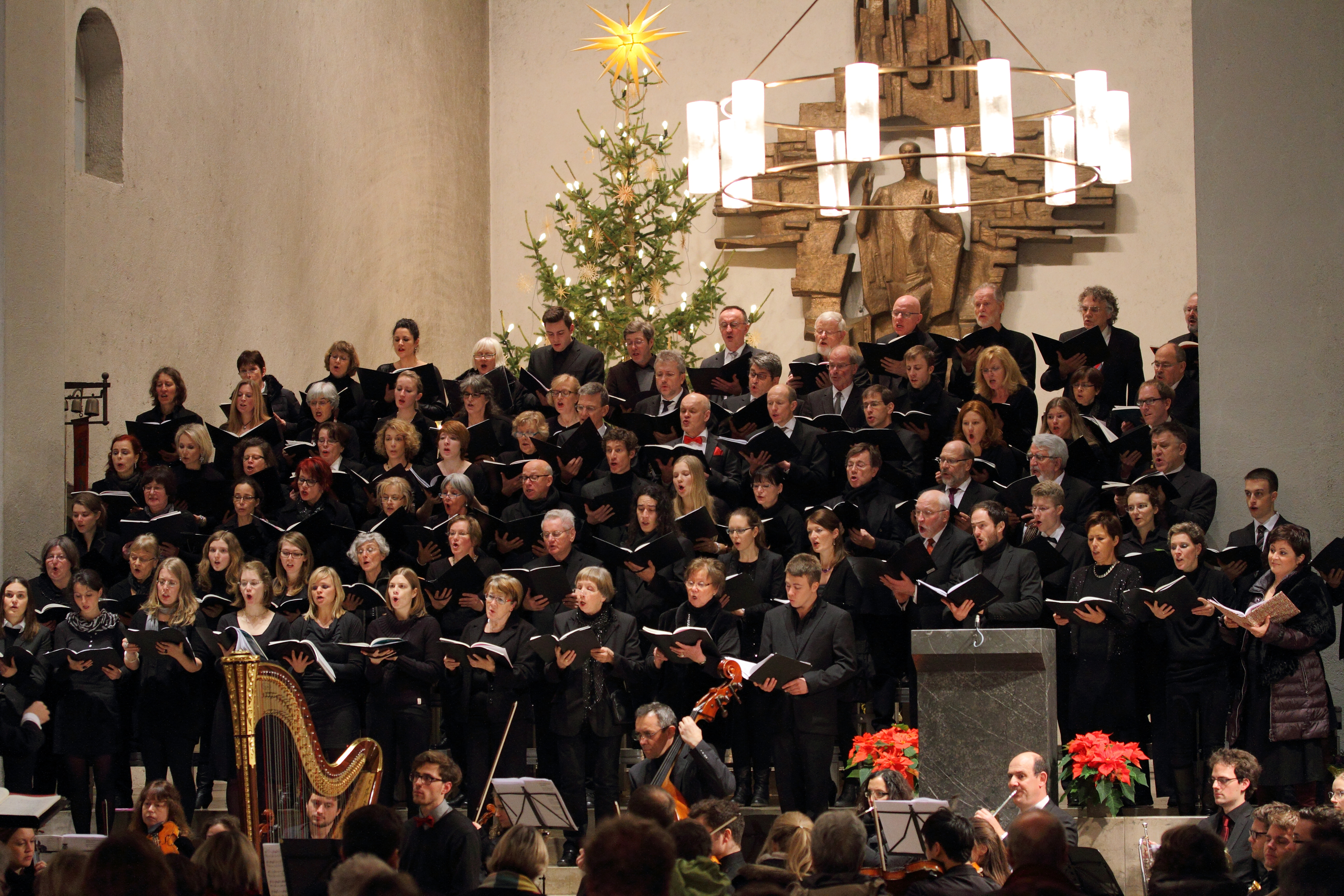 Der Oratorienchor Würzburg mit der Aufführung des Stern von Bethlehem von Josef Rheinberger in der Heiligkreuzkirche Würzburg. Leitung: Matthias Göttemann, Sopran: Anke Endres, Bariton: Janno Scheller, Harfe: Markus Thalheimer.